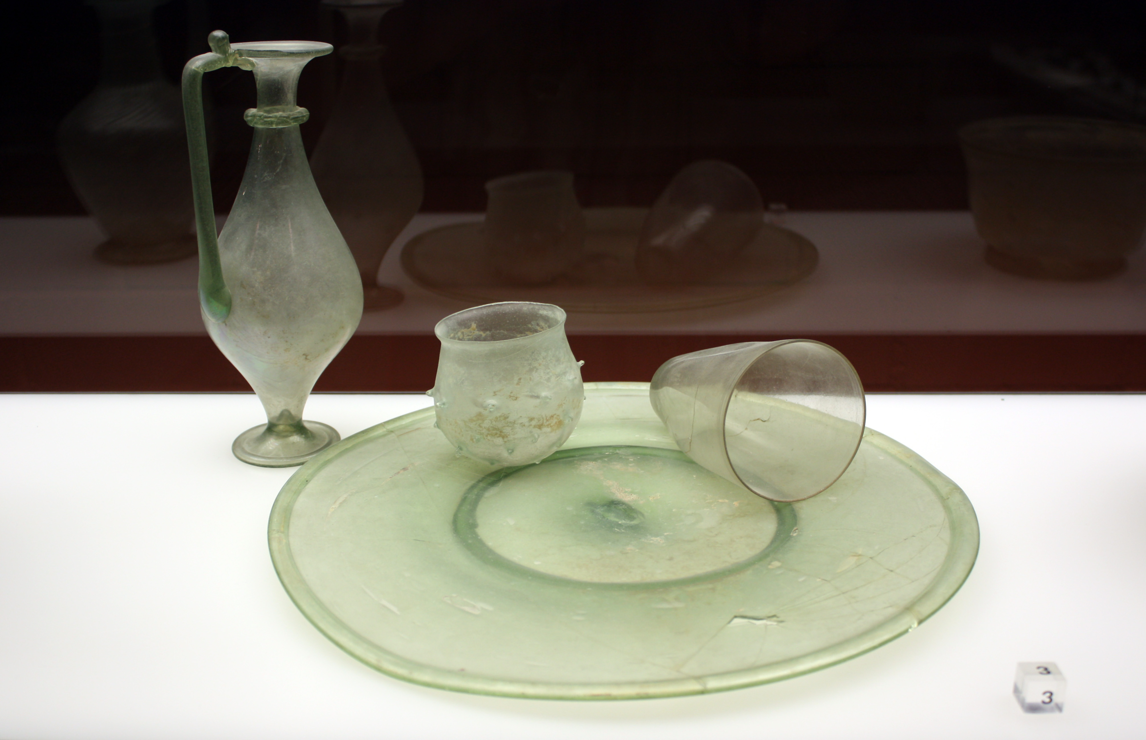 Römischer Wasserkrug und Becher etc. aus Glas. Fundort: Köln, Luxemburger Straße, heutiger Standort, Römisch Germanisches Museum in Köln.